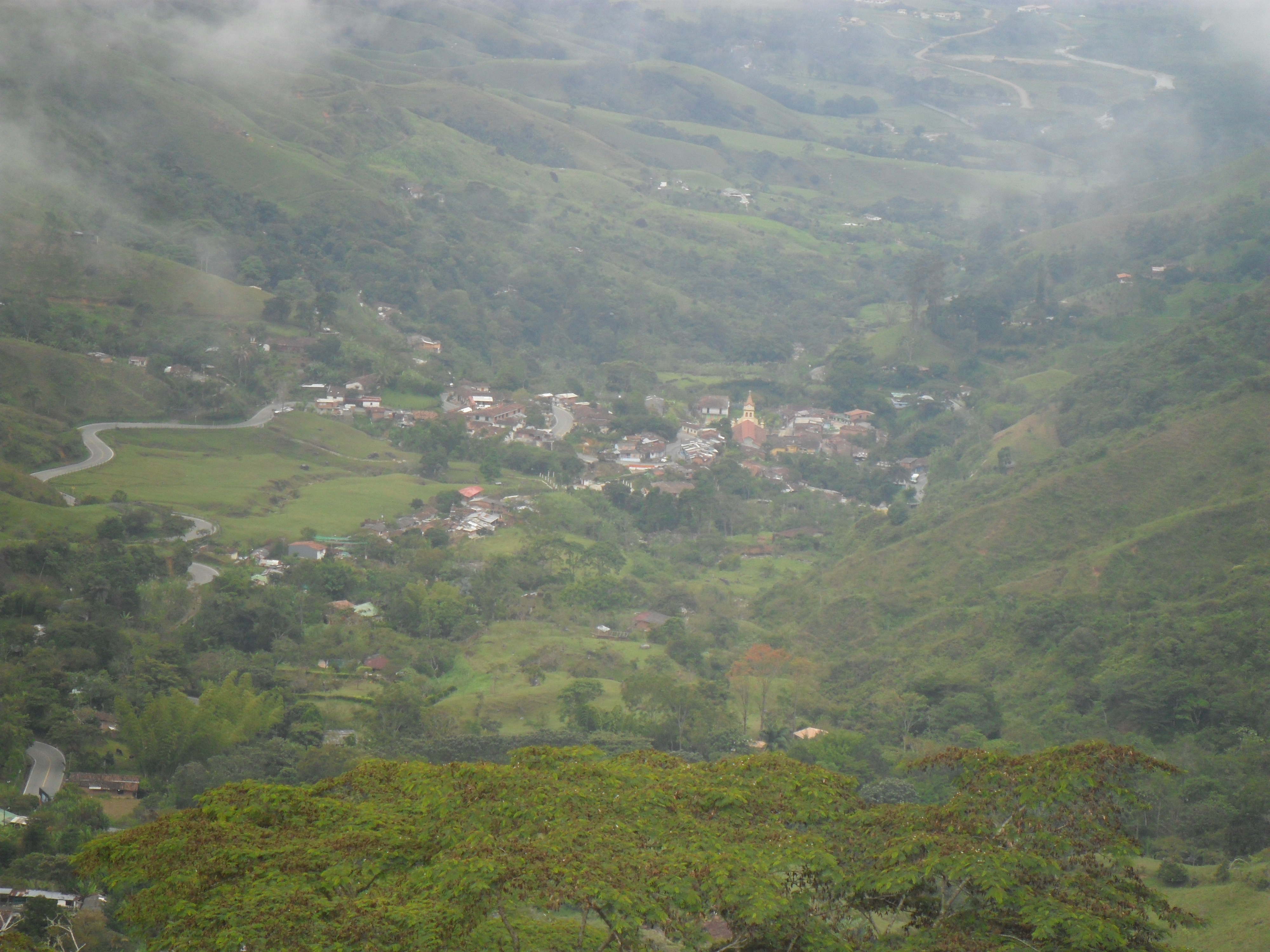 Vista de Santiago, corregimiento de Santo Domingo, desde el Alto de La Quiebra, 2013.